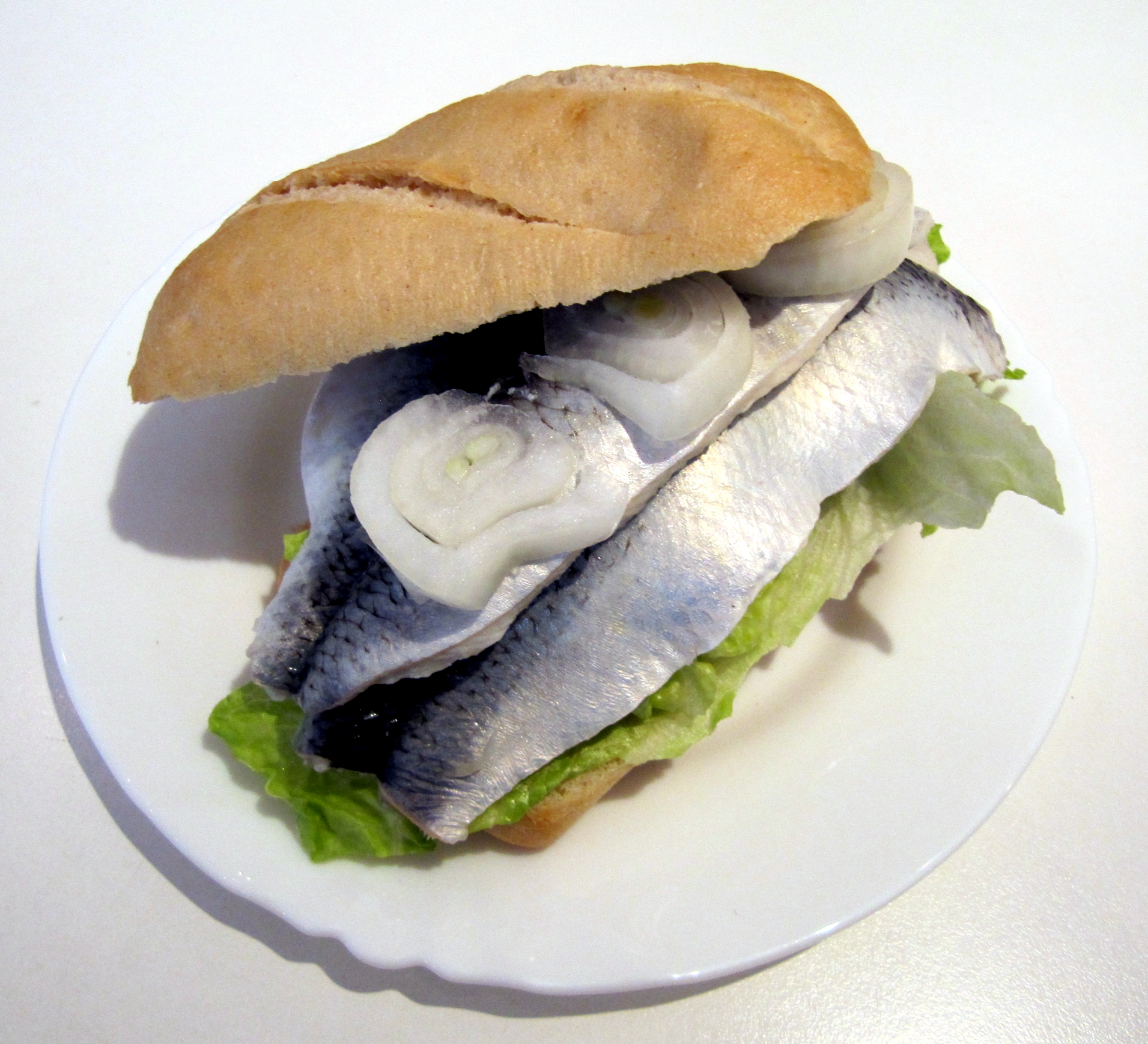 GT_Bismarckheringfischbrötchen_1